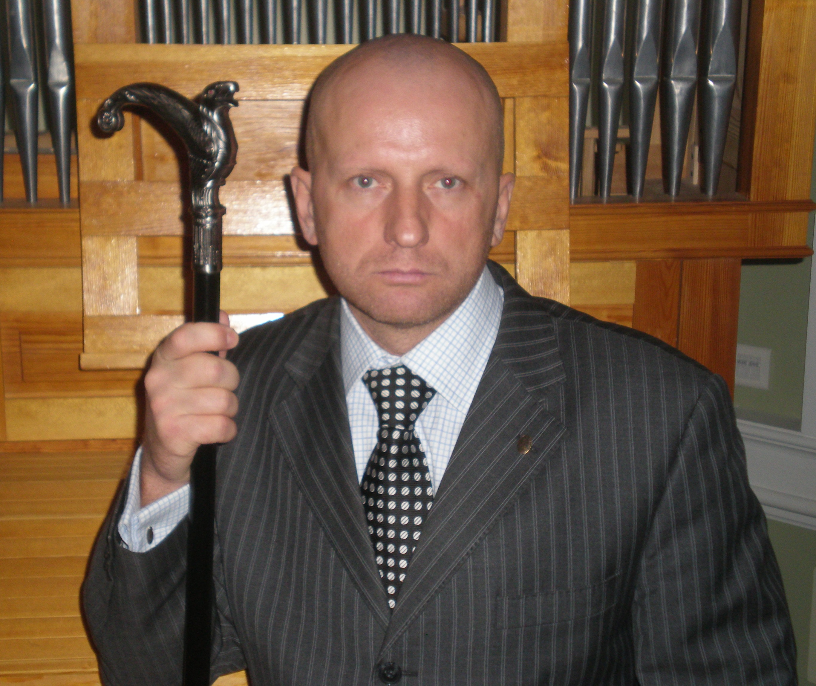 Мое фото